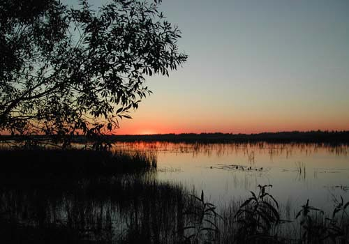 Фото реки Бужа